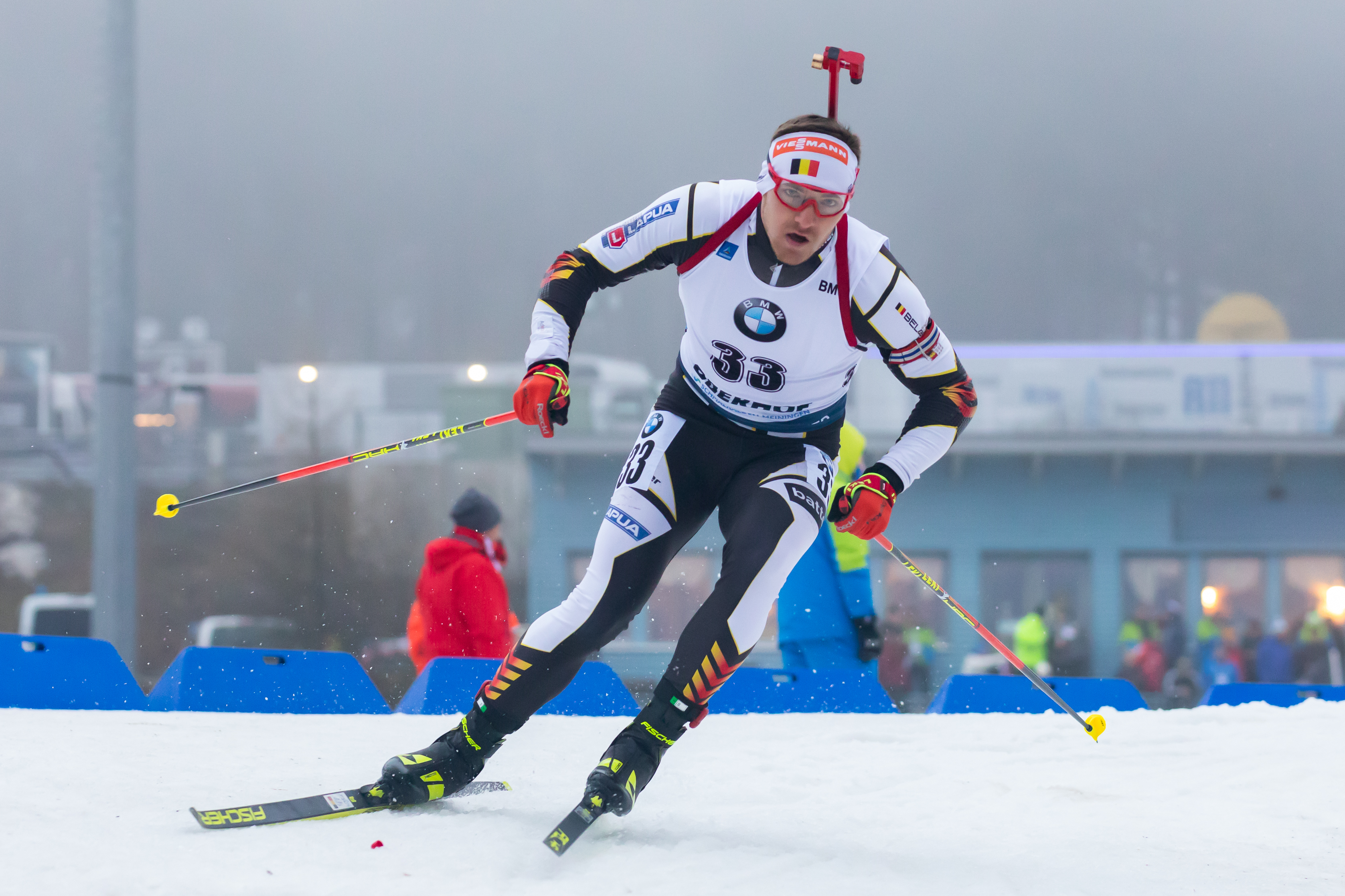 IBU World Cup Biathlon Oberhof; Florent Claude (BEL, Belgien)